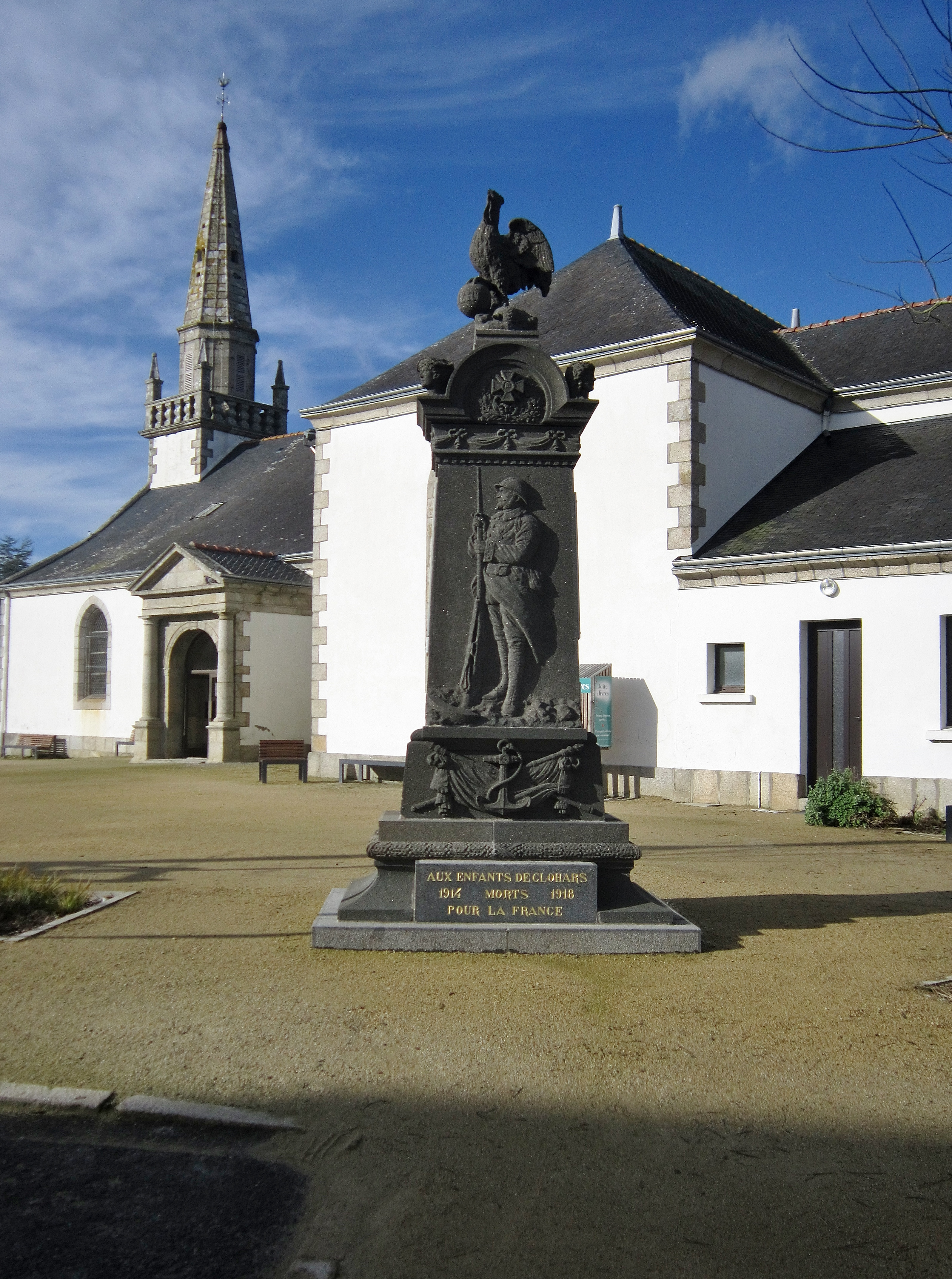 Le monument aux morts de Clohars-Carnoët, devant l'église paroissiale.